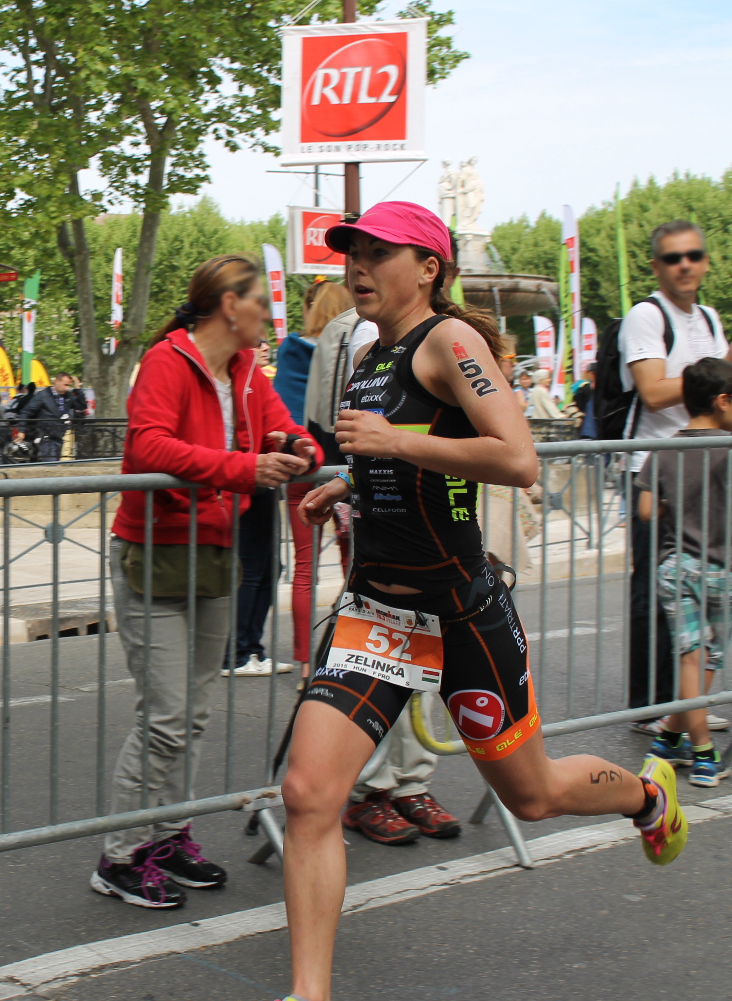 Gabriella Zelinka Vainqueur Ironman 70.3 Pays d'Aix 2015